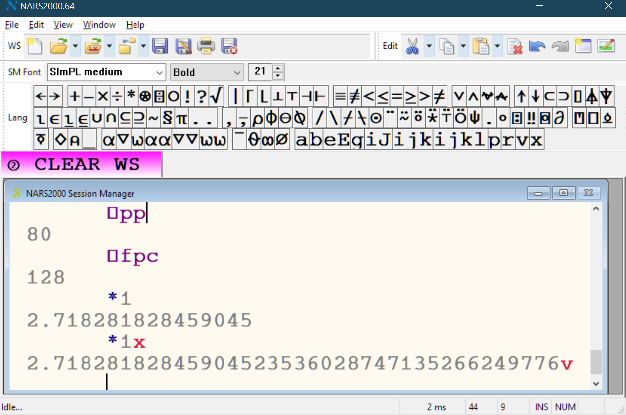 Possibilité de modifier à tout moment les précisions d'affichage et de calcul flottant avec deux variables système. Le suffixe x derrière une constante indique qu'on veut celle-ci de précision arbitraire.